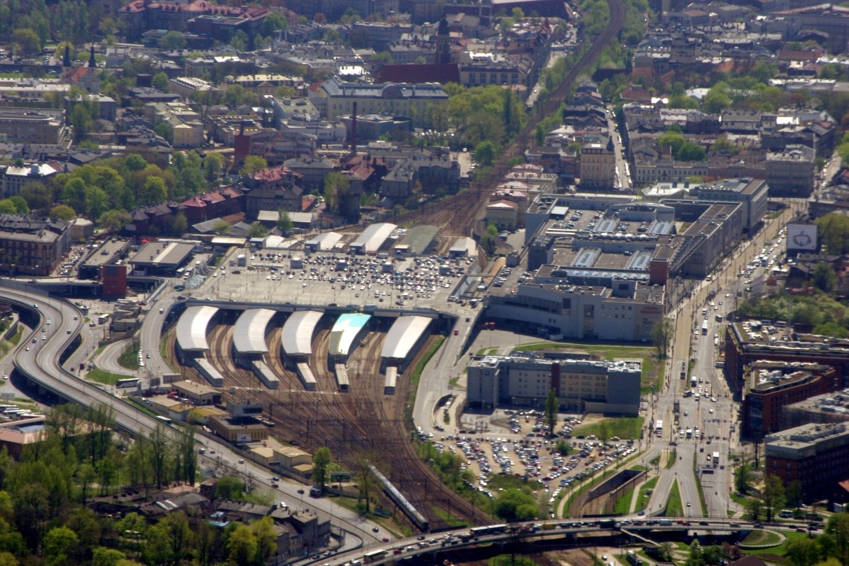 Dworzec PKP